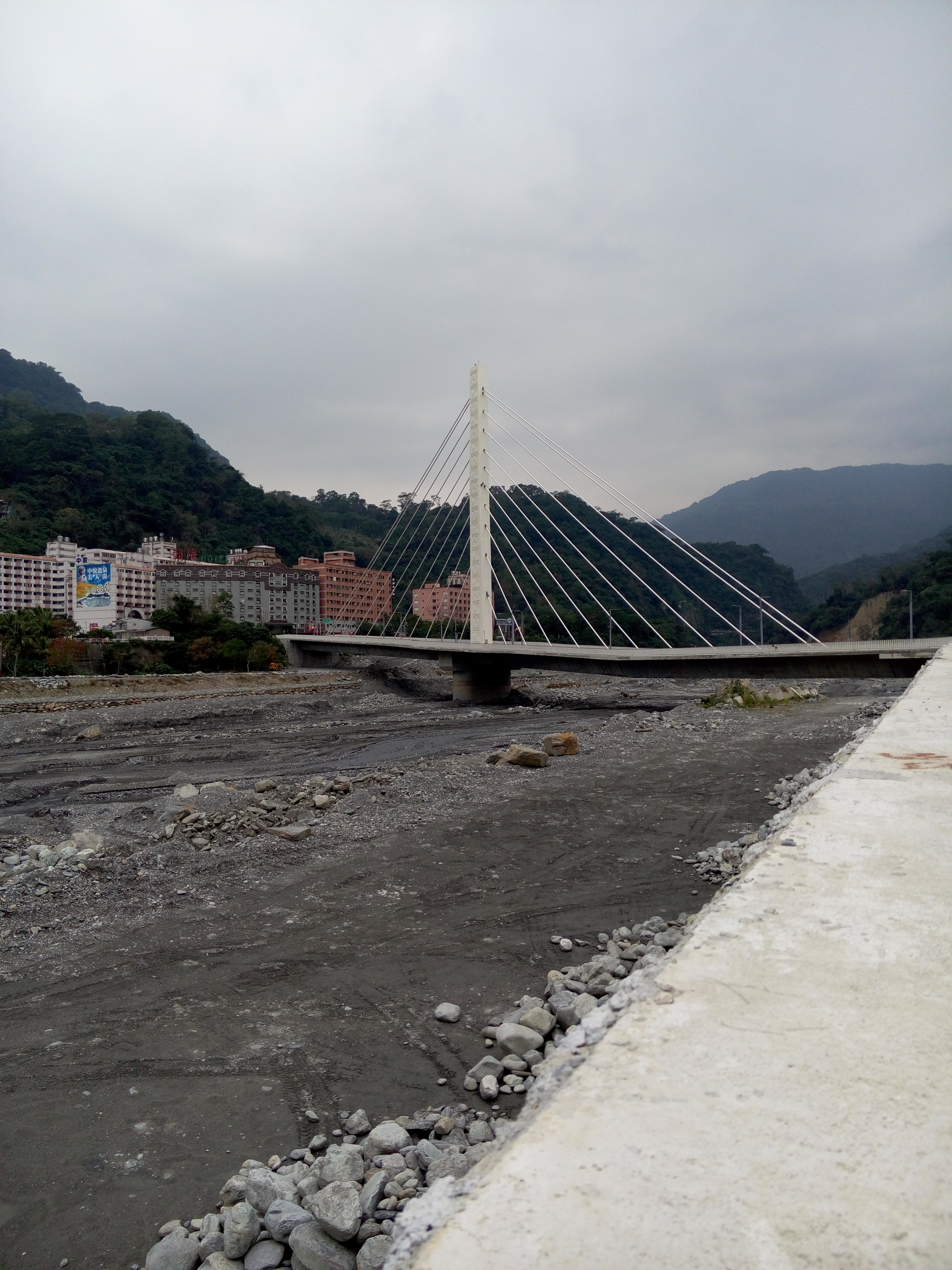 中華民國(臺灣)臺東縣知本溫泉區勇男橋中文（中国大陆）: 台湾台东县知本温泉区勇男桥